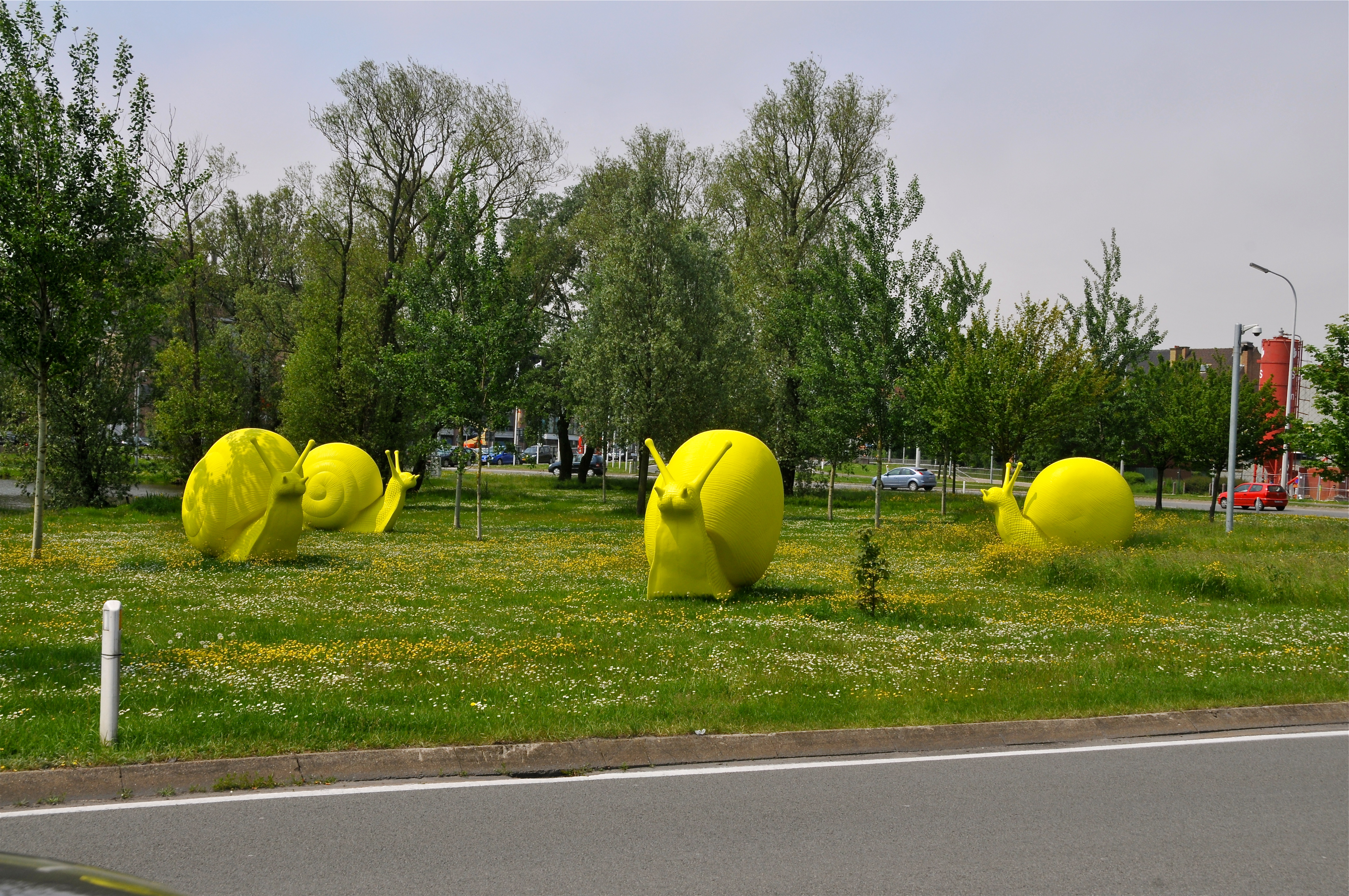 De gele slakken zijn een ontwerp van de Belgische kunstenaar William Sweetlove (Oostende 1949) en z’n collectie Cracking Art Group. In de avonduren zijn de slakken vanbinnenuit verlicht.